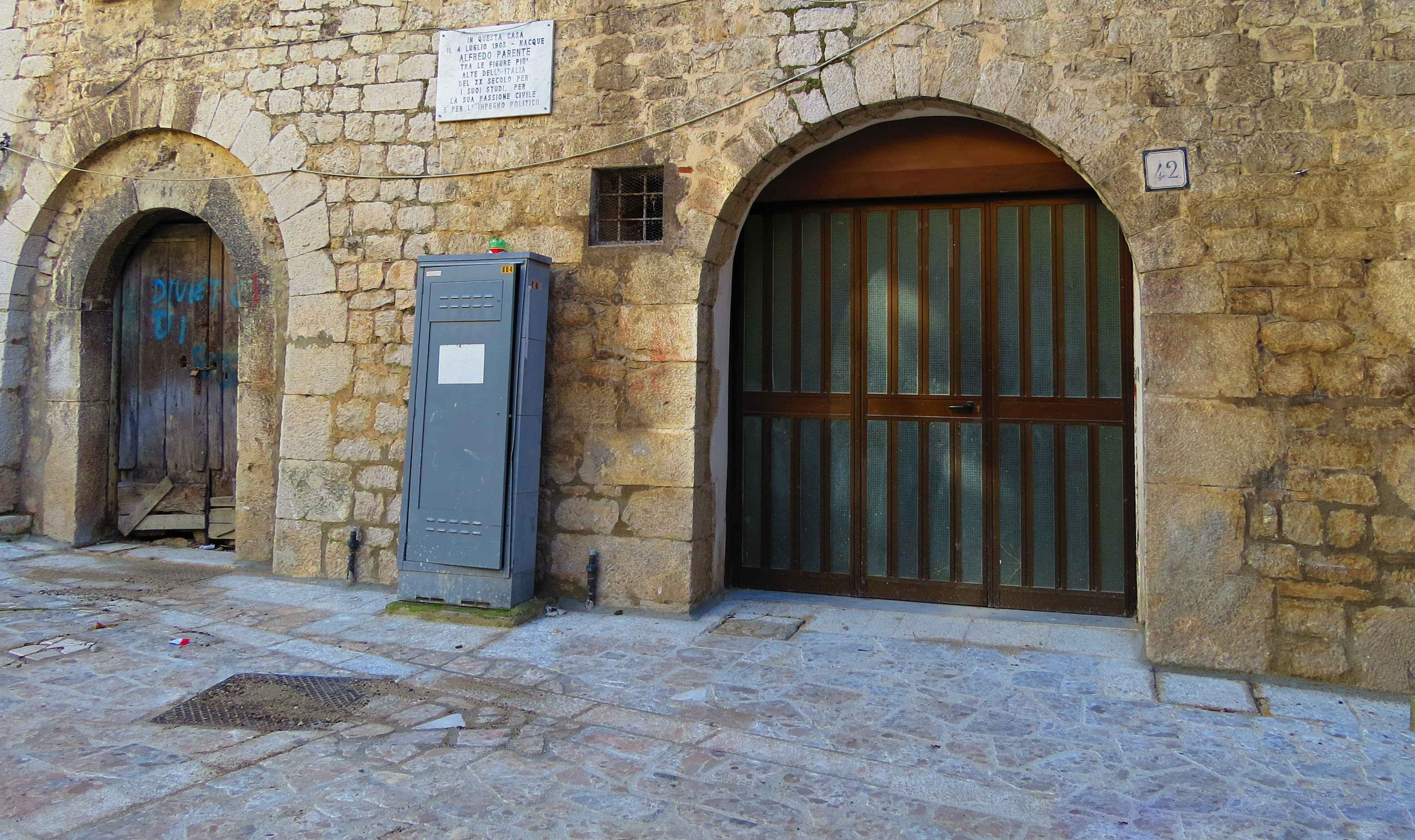 Centro storico di Guardia Sanframondi (BN)